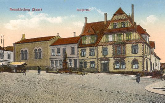 Ehemalige Synagoge in Neunkirchen (Saar)